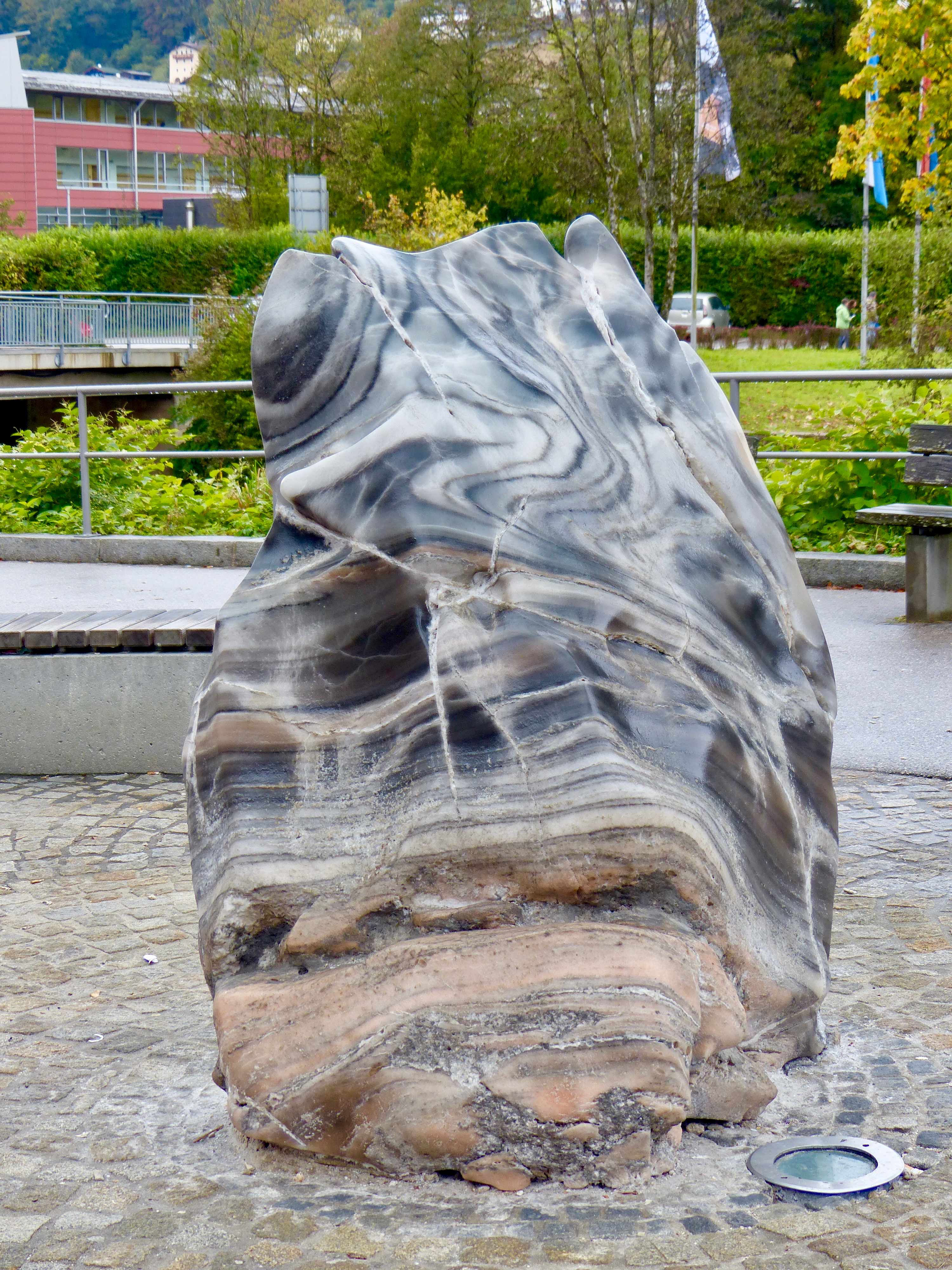 Salzbergwerk Berchtesgaden (Geotop im Landkreis Berchtesgadener Land): Salz aus dem Bergwerk